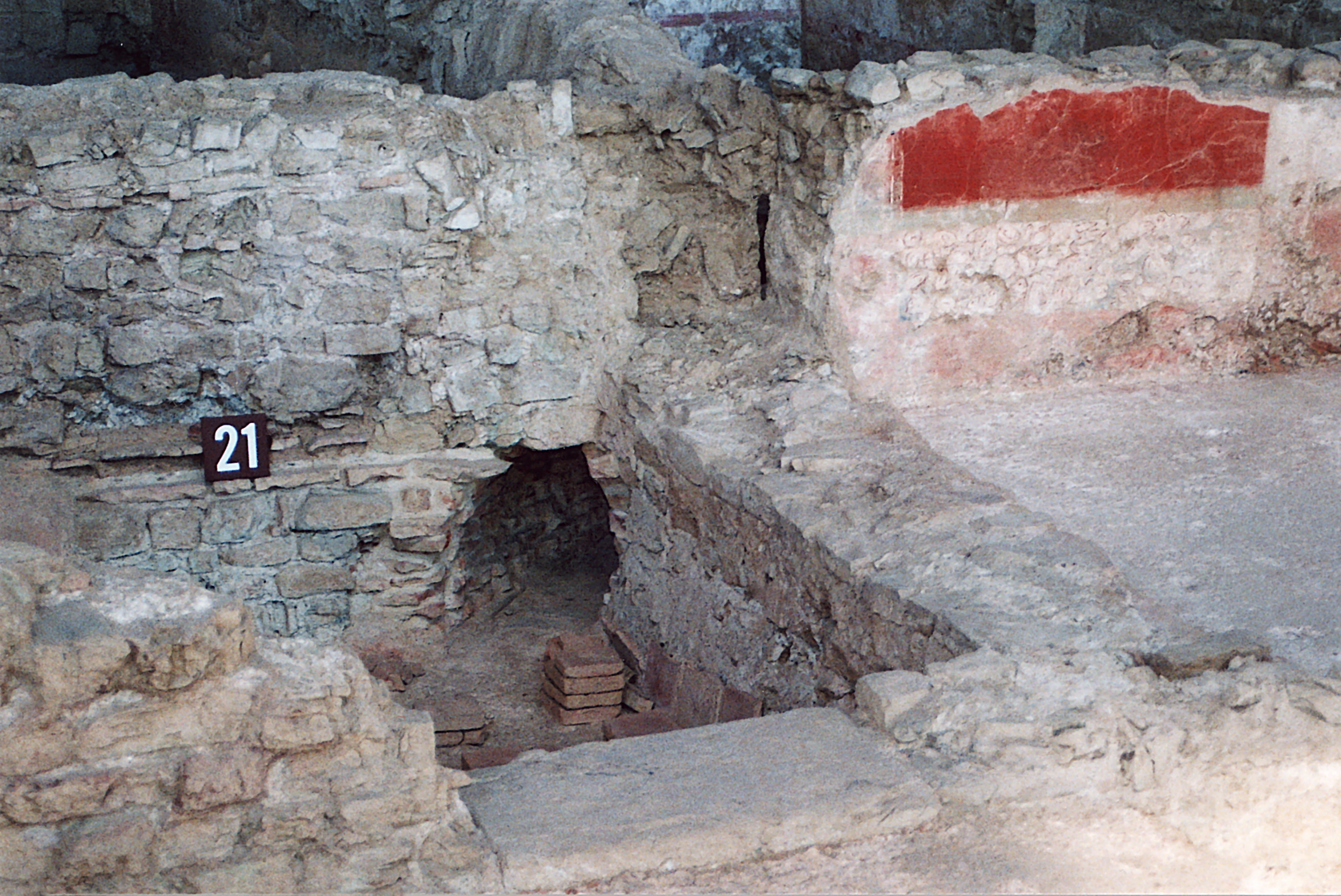 Villa Rustica Ahrweiler: Der in die Zeit von Haus II gehörende Anbau (21) mit seiner Hypokaustanlage wurde zunächst über den Nebenraum mitbeheizt. Offenbar genügte das den Gutsbesitzern irgendwann nicht mehr, so daß ein eigener Heizkanal vom Praefurnium (Heizraum) aus in Raum 21 getrieben wurde. Die Malerreien in dem danebenliegenden Raum gehören zu einem von Anfang an existierenden Zimmer, das ein sehr großes Fenster auf den Portikus hinaus hatte.